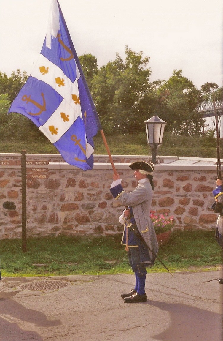 Troupes de la Marine, Fort de l'Île Sainte-Hélène, Montréal